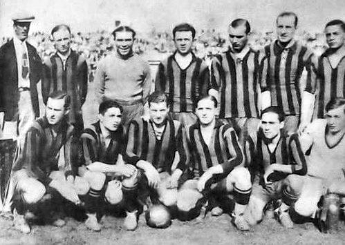 Formación del Club Atlético Peñarol de Uruguay que enfrentó a Rosario Central en Argentina el día 27 de octubre de 1929, en cotejo amistoso celebrado para inaugurar las tribunas de cemento en el estadio de Arroyito.